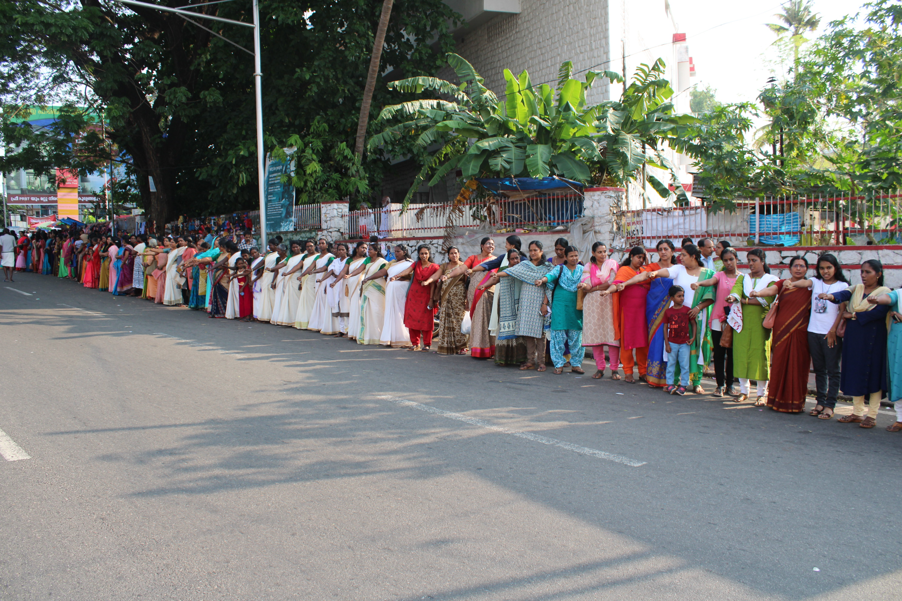 വനിതാ മതില്‍ - കൊല്ലം